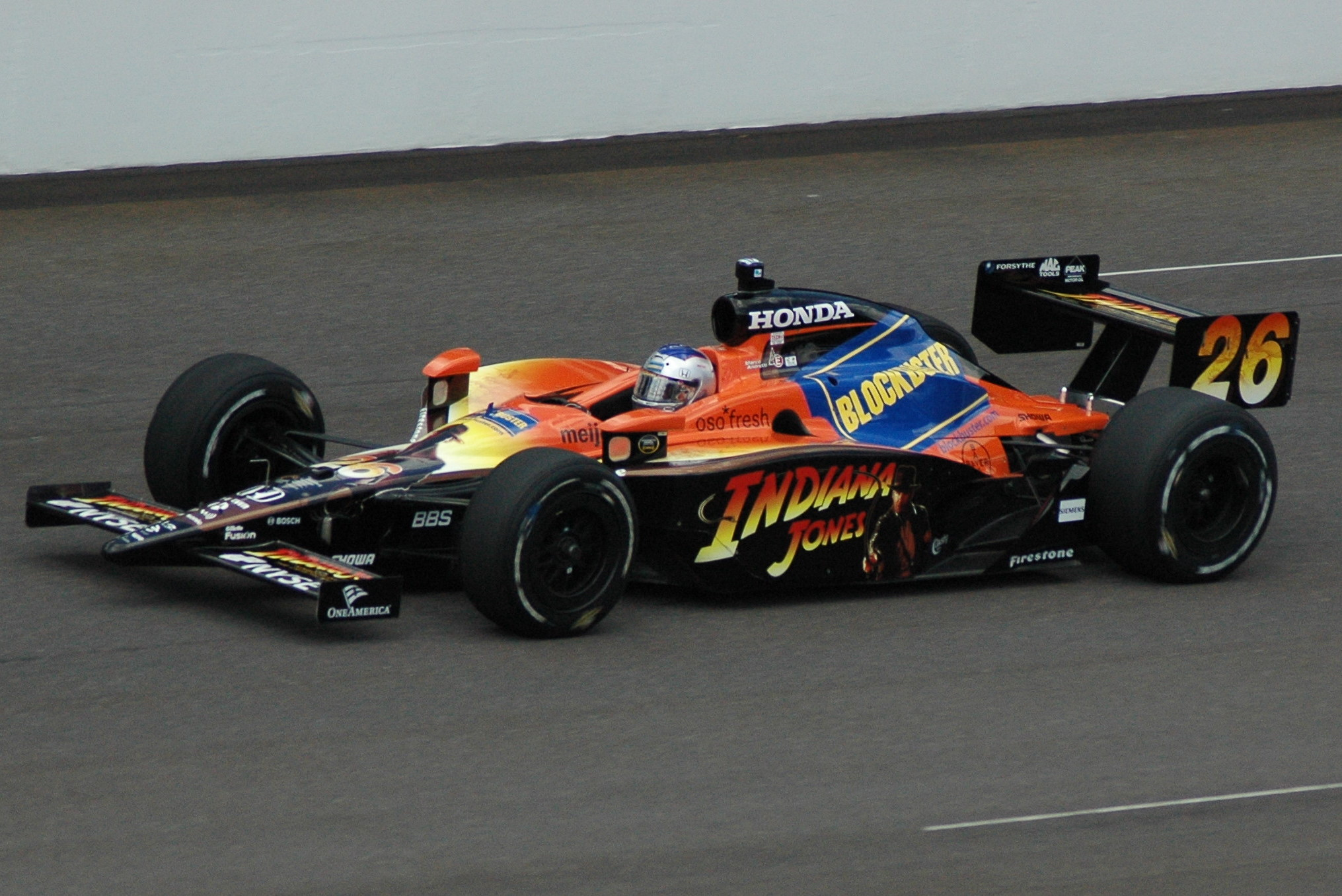 Marco Andretti at Indianapolis 500 practice.